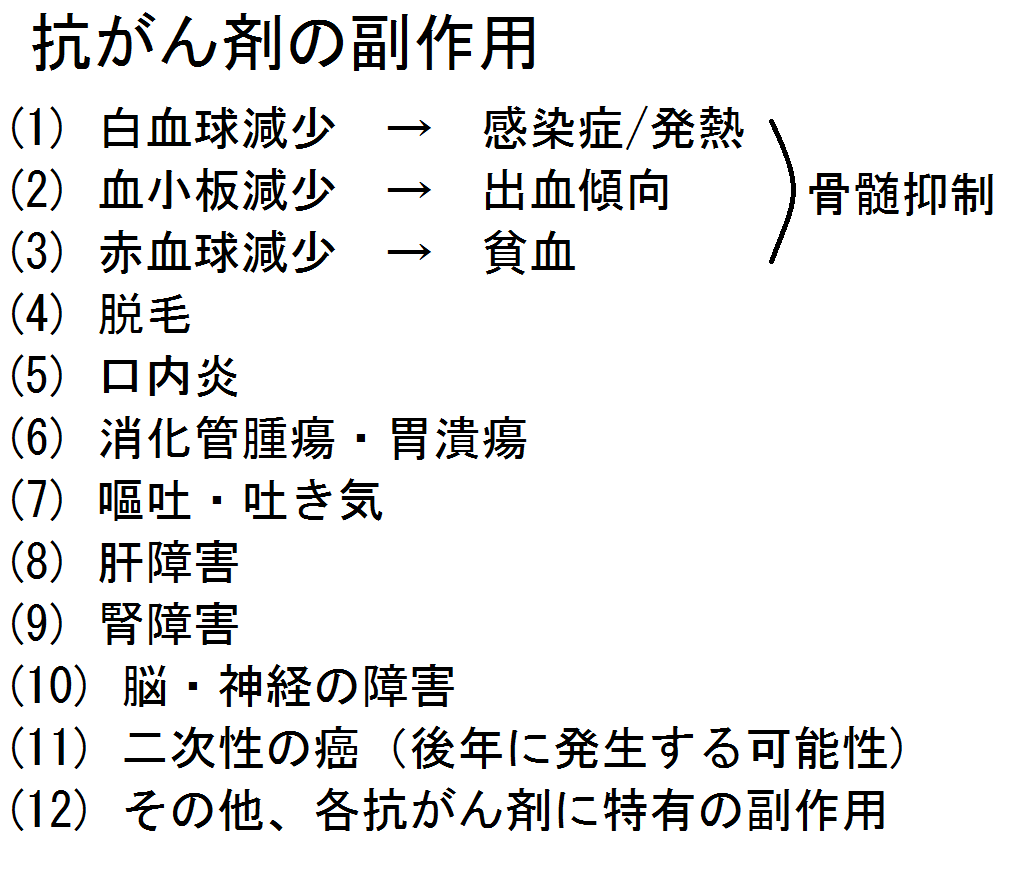 抗がん剤の副作用 出典 『三輪血液病学』P.630